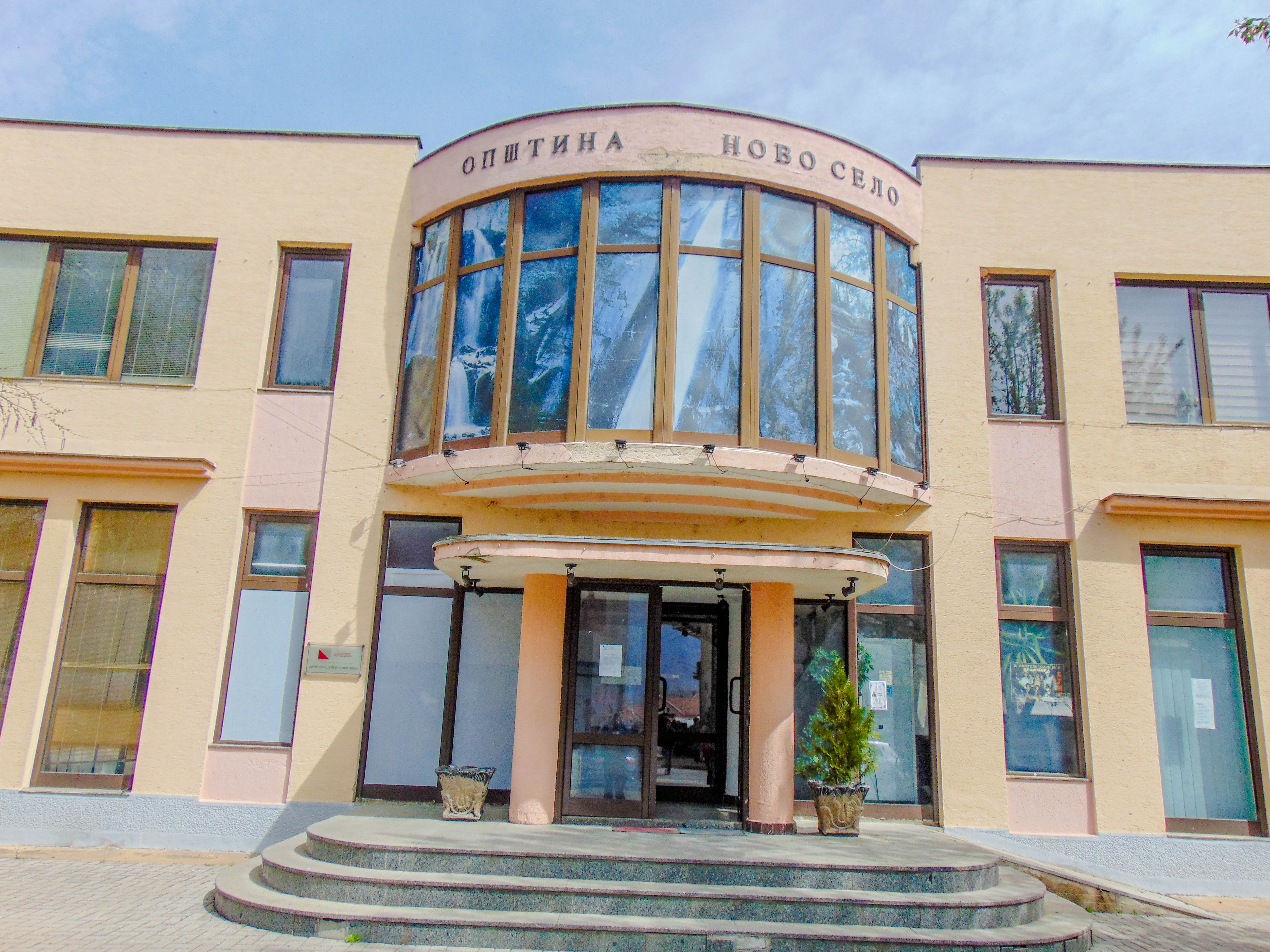 Зградата на Општина Ново Село